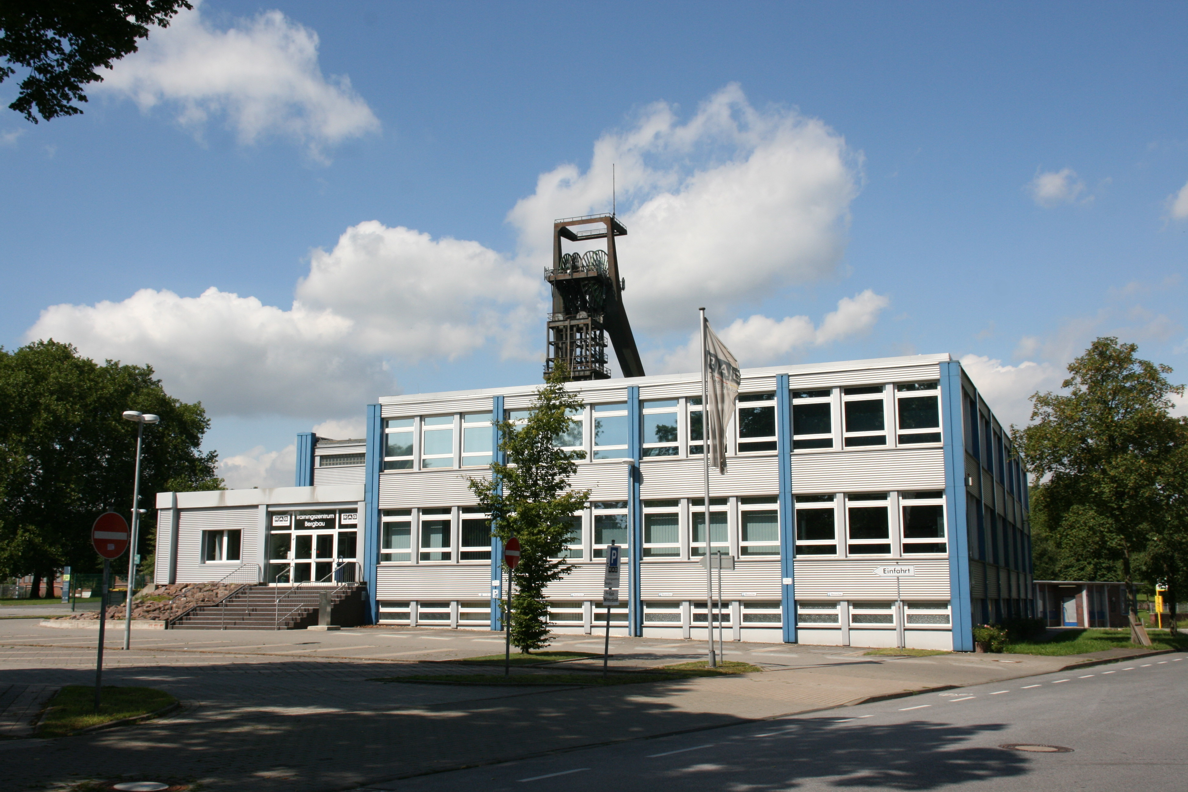 Trainingszentrum Bergbau der RAG, Karlstraße 55 inRecklinghausen